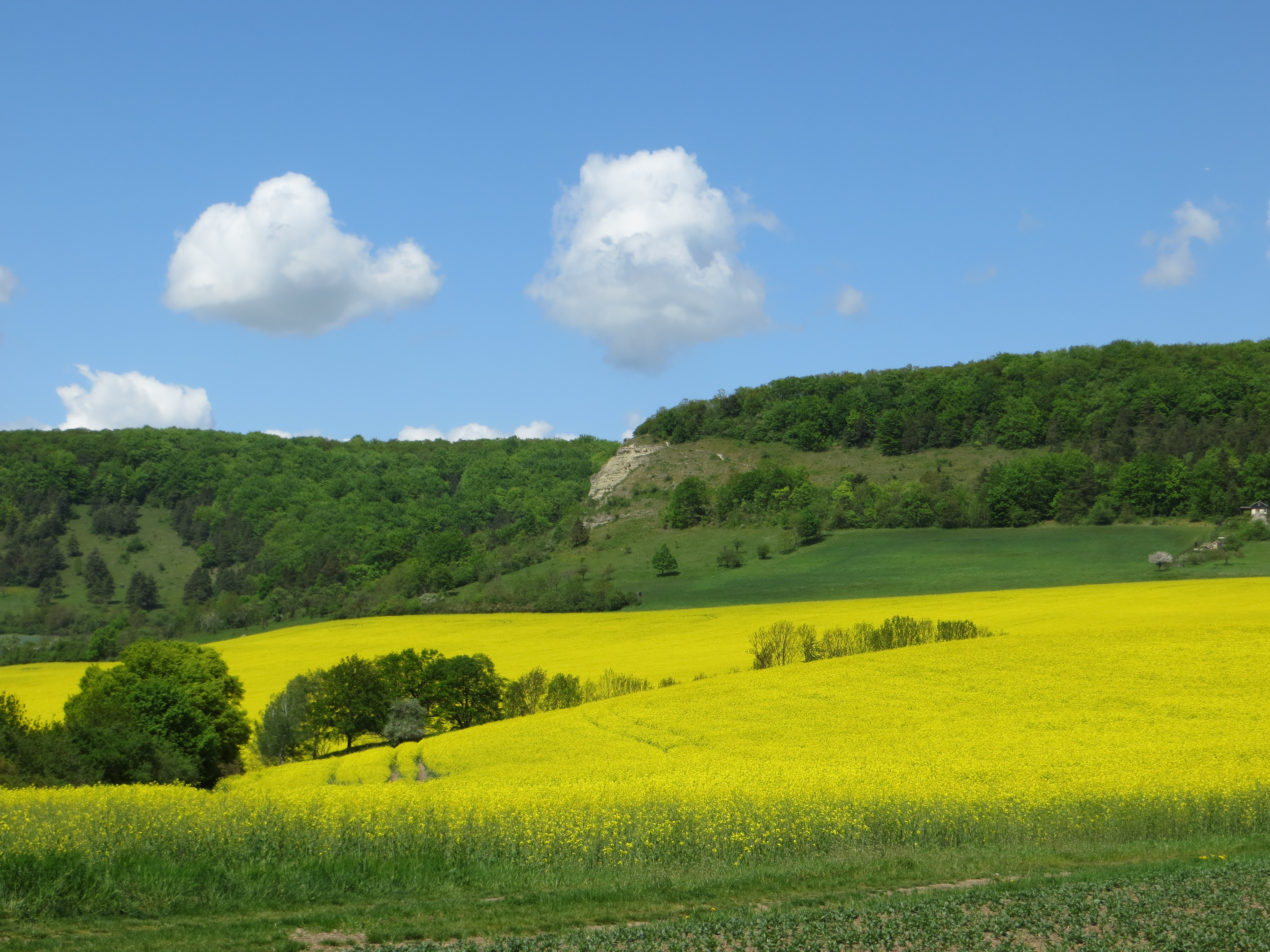 Blick auf die Zietschkuppe, die im „Naturschutzgebiet Gleistalhänge“ (NSG 273) liegt; Rapsfeld im Vordergrund